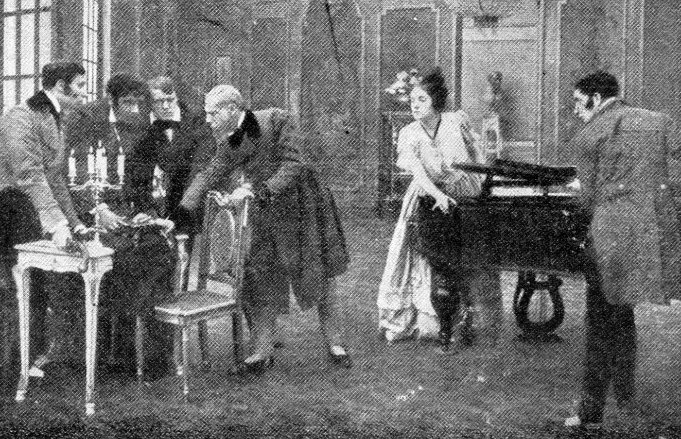 Il pianoforte sienzioso - regia di Luigi Maggi - produz "Ambrosio Film Torino - 1910 - foto di scena